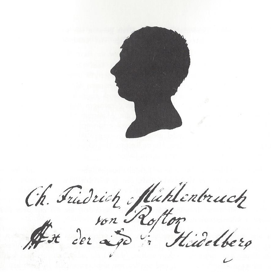 Schattenriss mit Widmung von Friedrich Mühlenbruch.